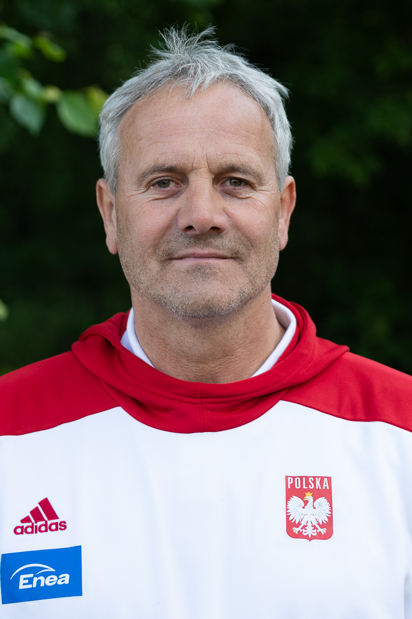 Trener polskiej reprezentacji narodowej we wioślarstwie (wiosła długie), Wojciech Jankowski, w 2019 roku. Wcześniej wioślarz, brązowy medalista Igrzysk Olimpijskich w Barcelonie.